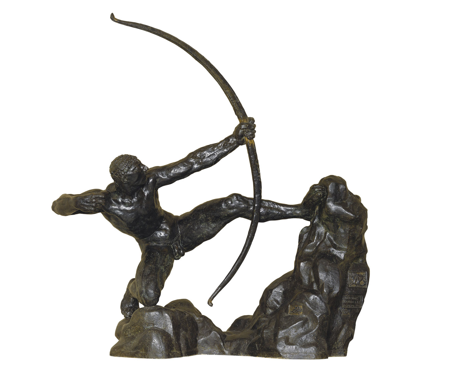 Héraklès tue les oiseaux du lac Stymphale, Antoine Bourdelle, Bronze, H. 250 ; L. 237 ; P. 104,5 cm, Acquis de l’artiste, 1927, Musée des Beaux-Arts, Lyon, France.